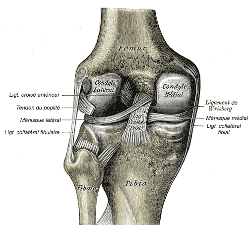 Ligaments du genou